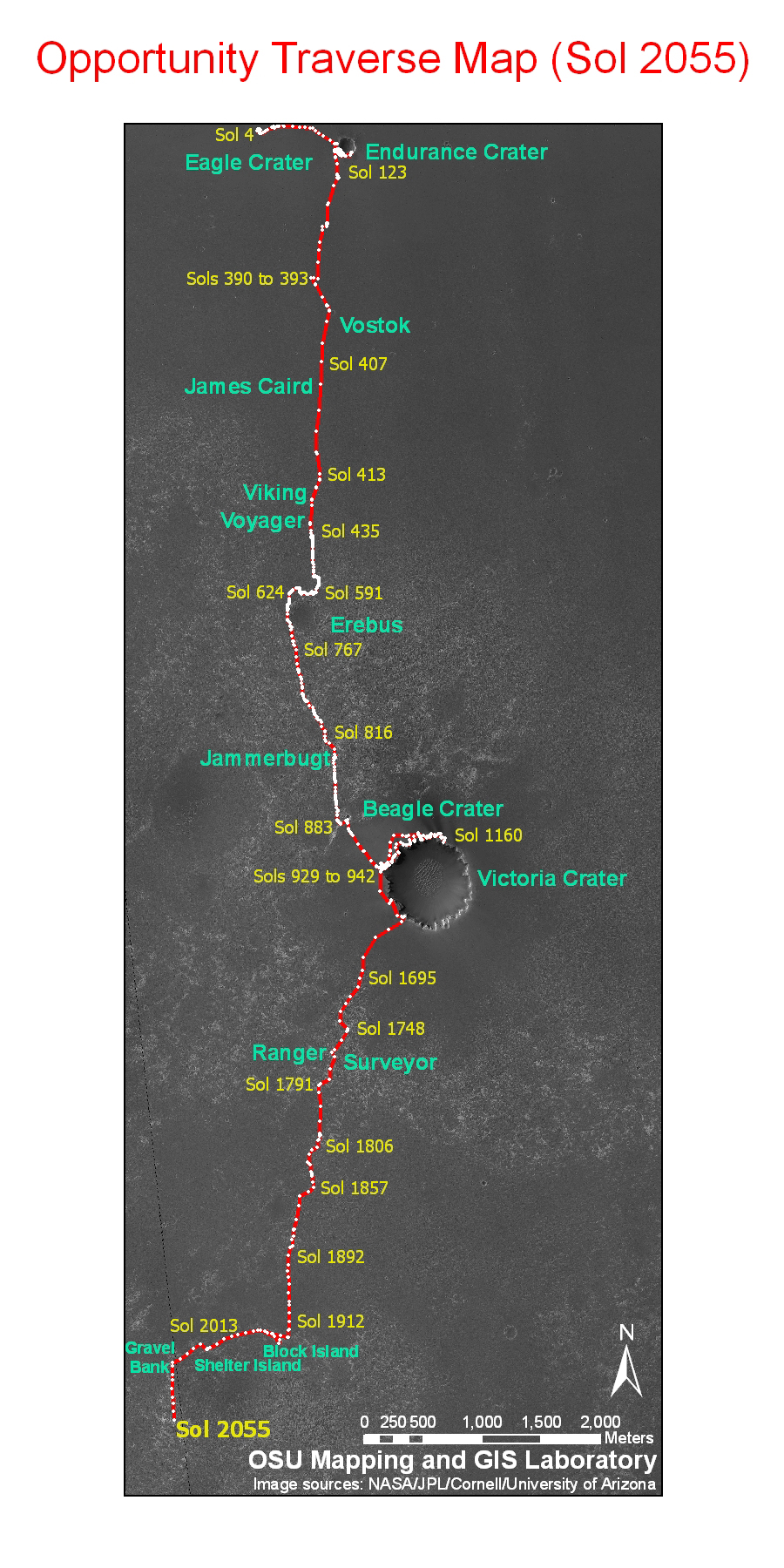 Mars Exploration Rover V (Opportunity) Traverse map at